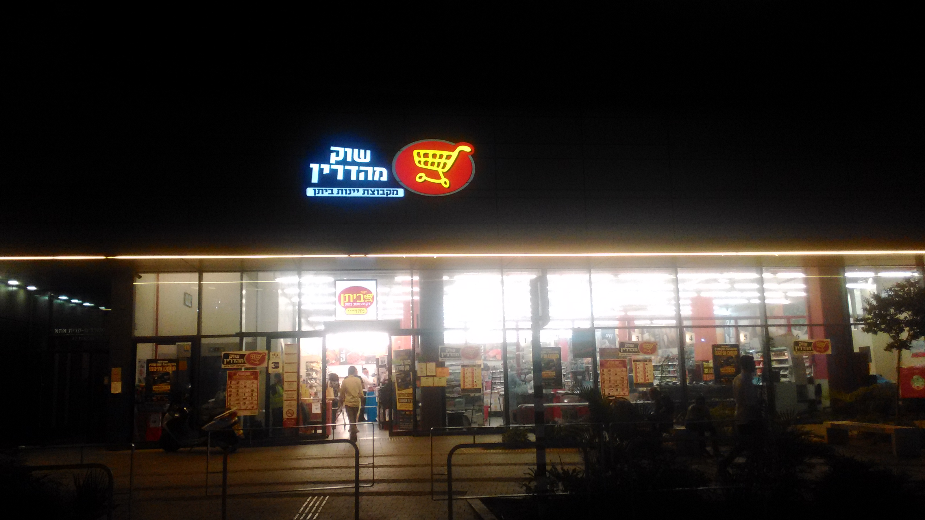 סניף יינות ביתן בקריית אתא